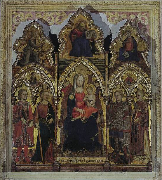 Madonna con il Bambino in trono e santi, 1438, Bartolomeo di Andrea Bocchi